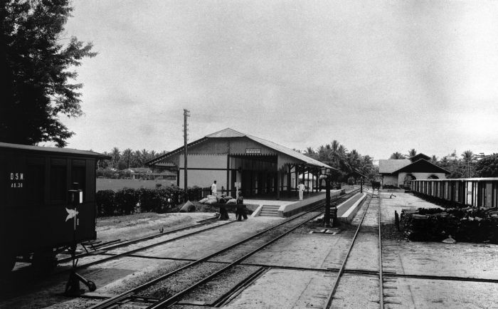 Foto. Het station van Perbaoengan langs de Deli-spoorlijn, oostkust Sumatra